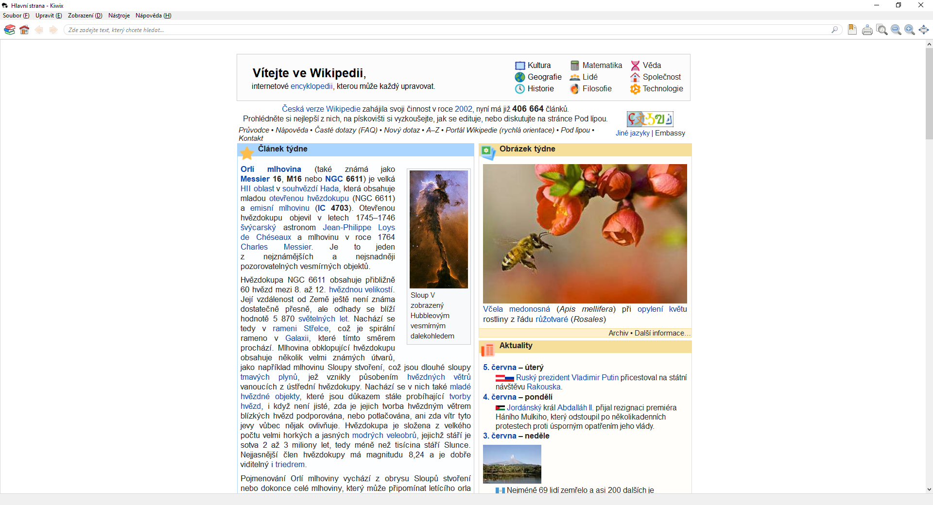 Screenshot české Wikipedie v prohlížeči Kiwix z června 2018